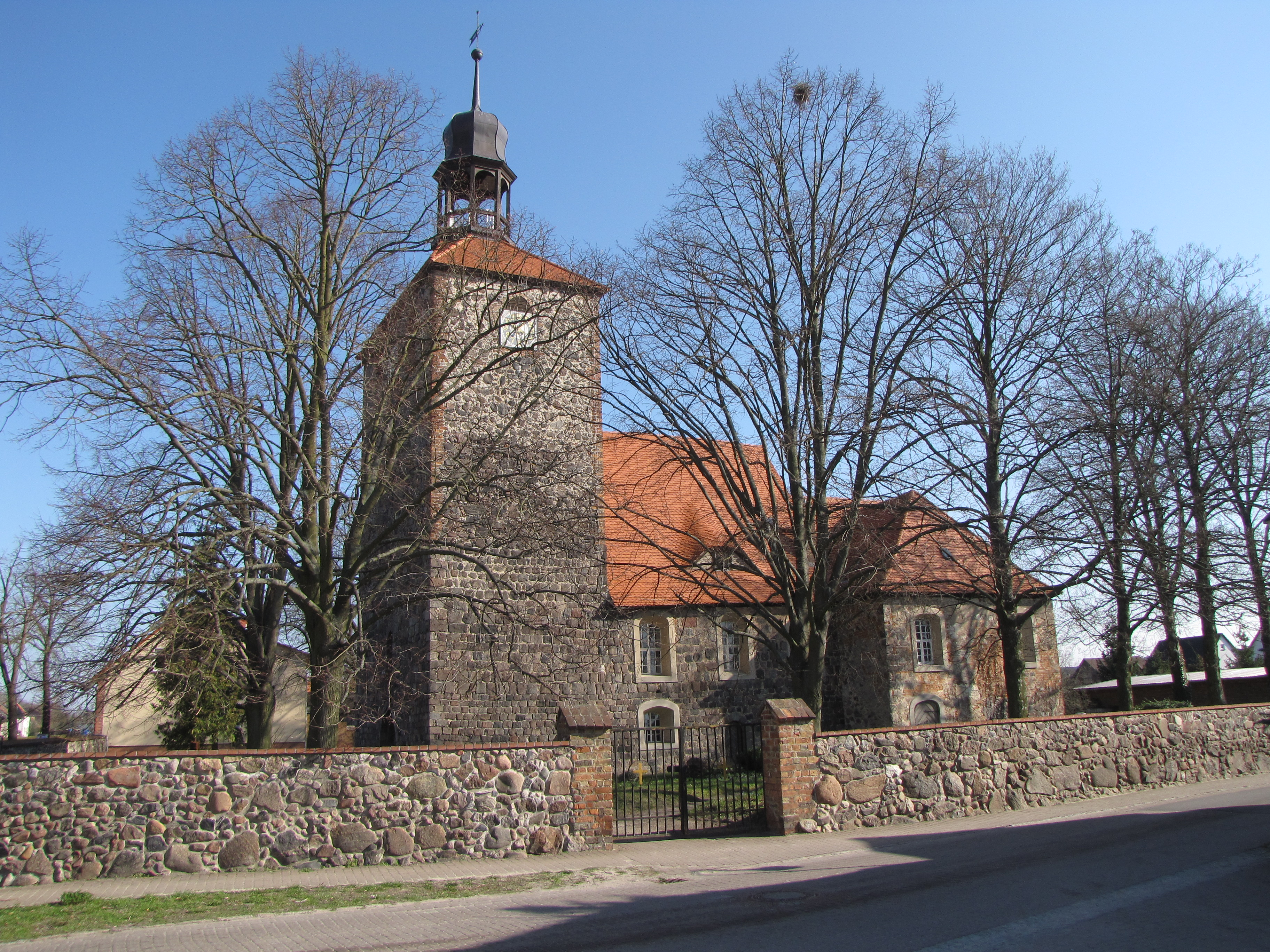 Dorfkirche Groß Machnow, Gem. Rangsdorf, Brandenburg, Ansicht der Südseite